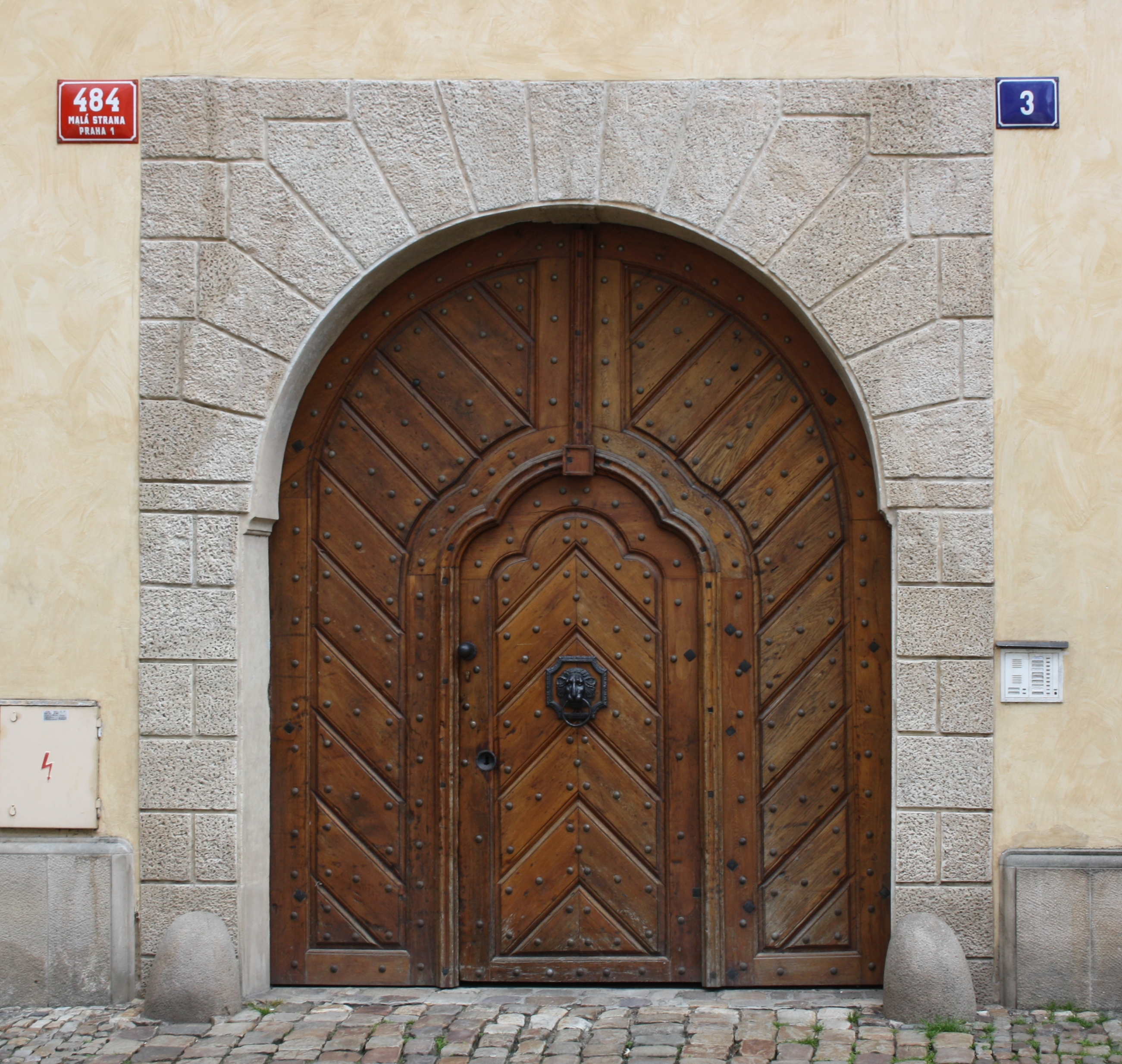 Praha, Malá Strana - Velkopřevorské náměstí 484 (portál)